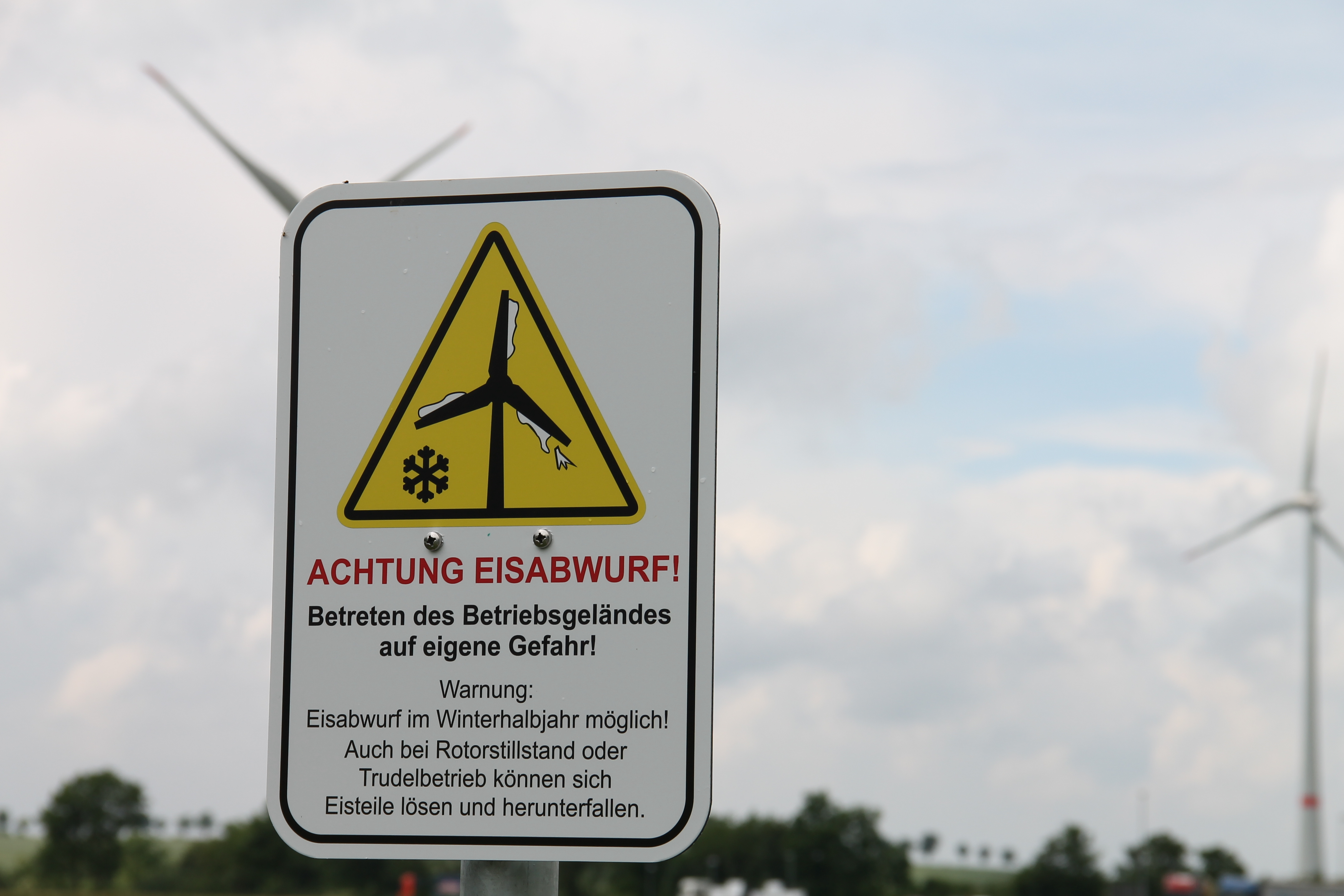 Warnschild vor Eiswurf an Windenergieanlagen im Windpark Sintfeld, Bad Wünnenberg